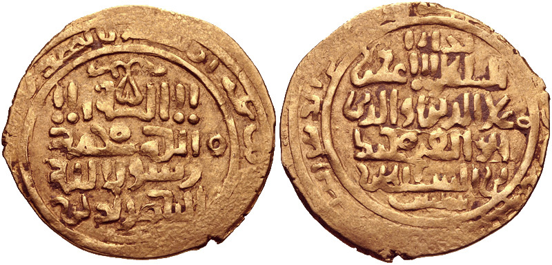 ISLAMIC, Persia (Post-Seljuk). Khwarizm Shahs. 'Ala al-Din Muhammad II. AH 596-617 / AD 1200-1220. AV Dinar (23mm, 4.17 g, 1h). Bukhara mint. Album 1712. VF.